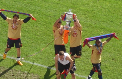 Футболисты ПФК ЦСКА (Москва) празднуют победу в Кубке России 2008 года